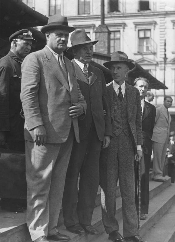 El presidente de la Asociación Internacional de la Inválidos de Guerra, Nedić (izquierda) en la estación de Varsovia en agosto de 1934.